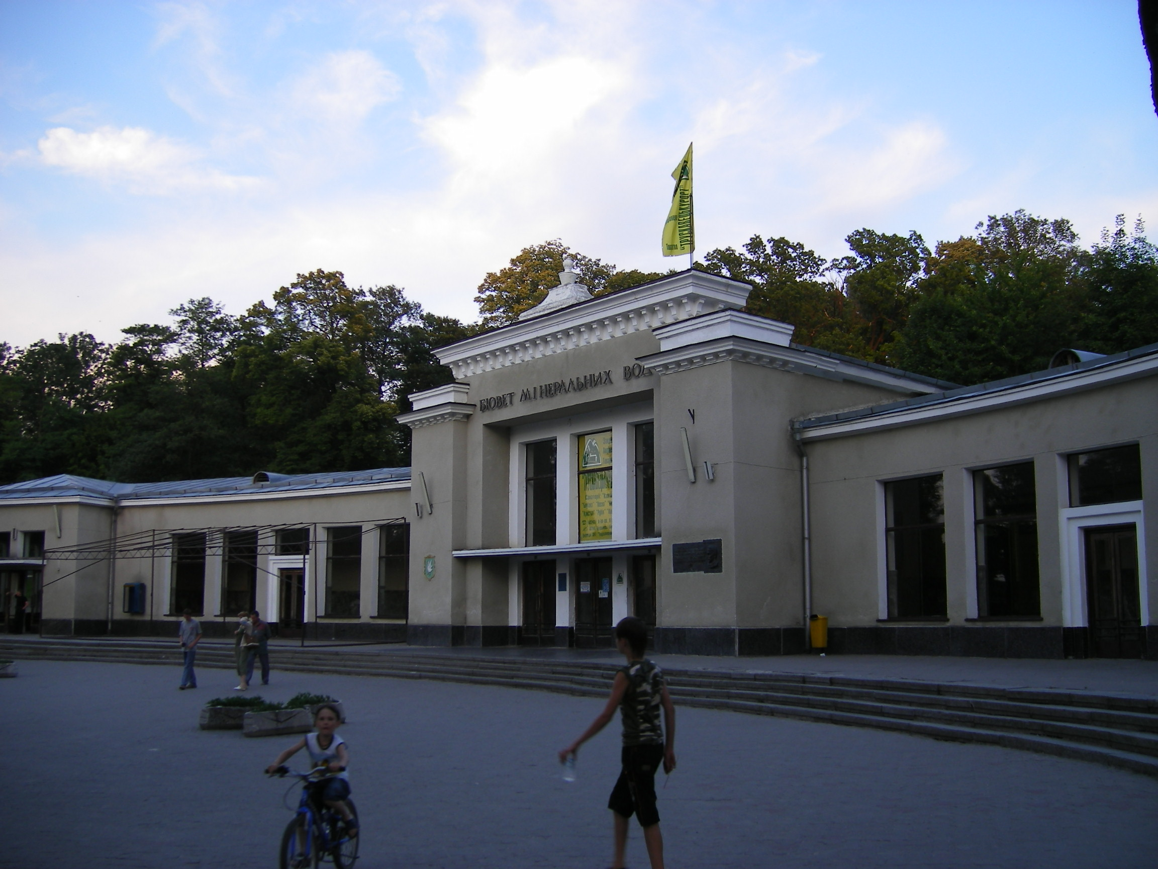 Truskavets